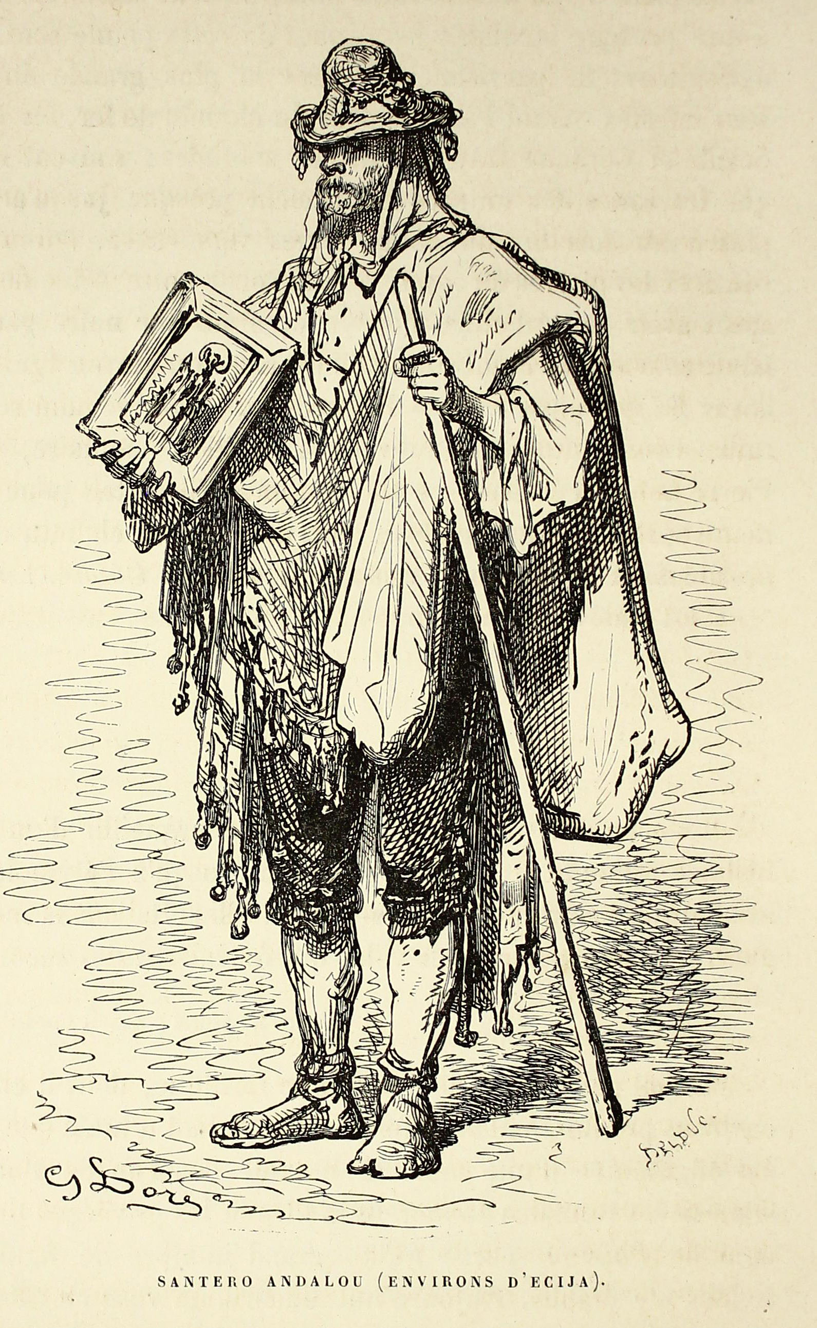 Autor: Davillier, Jean Charles, barón, 1823-1883 Descripción bibliográfica: L'Espagne / par Le Baron CH. Davillier ; ilustrée de 309 gravures dessinées su bois par Gustave Doré. - Paris : Librairie Hachette, 1874. - 799 p. : il. Materia: España- Geografía Materia: España- Usos y costumbres Ilustrador: Doré, Gustave, 1832-1883 Editor: Libreria Hachette Lugar de impresión: Francia, París Localización: Libro completo